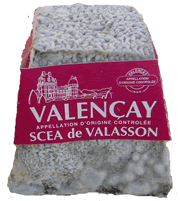 Valençay AOP